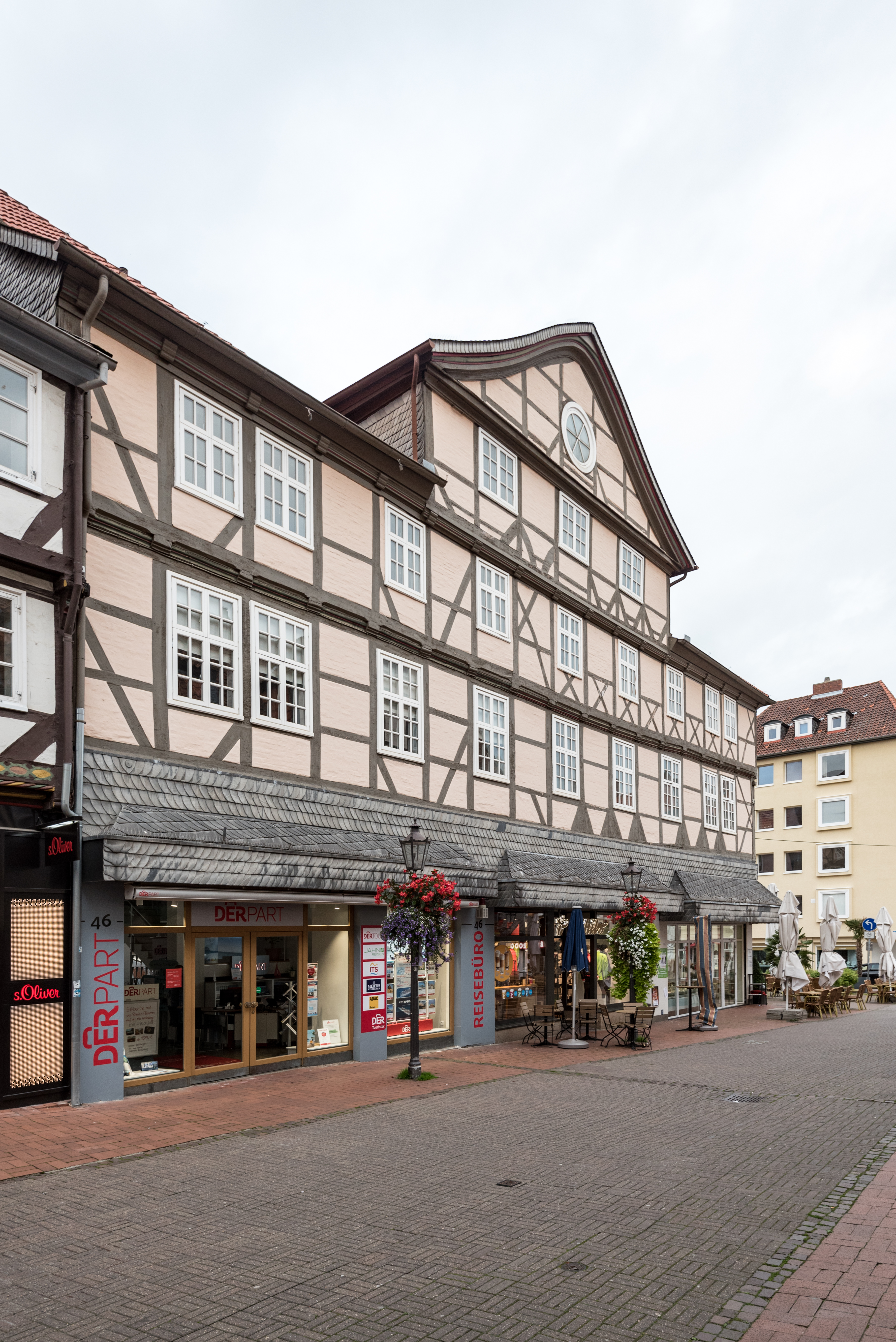 Wolfenbüttel, Langer Herzogstraße 46